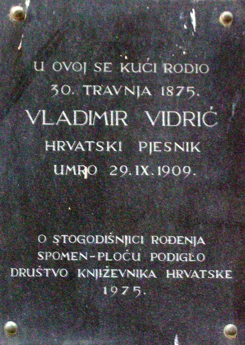 spomen ploča Vladimiru Vidriću, Zagreb, Hrvatska